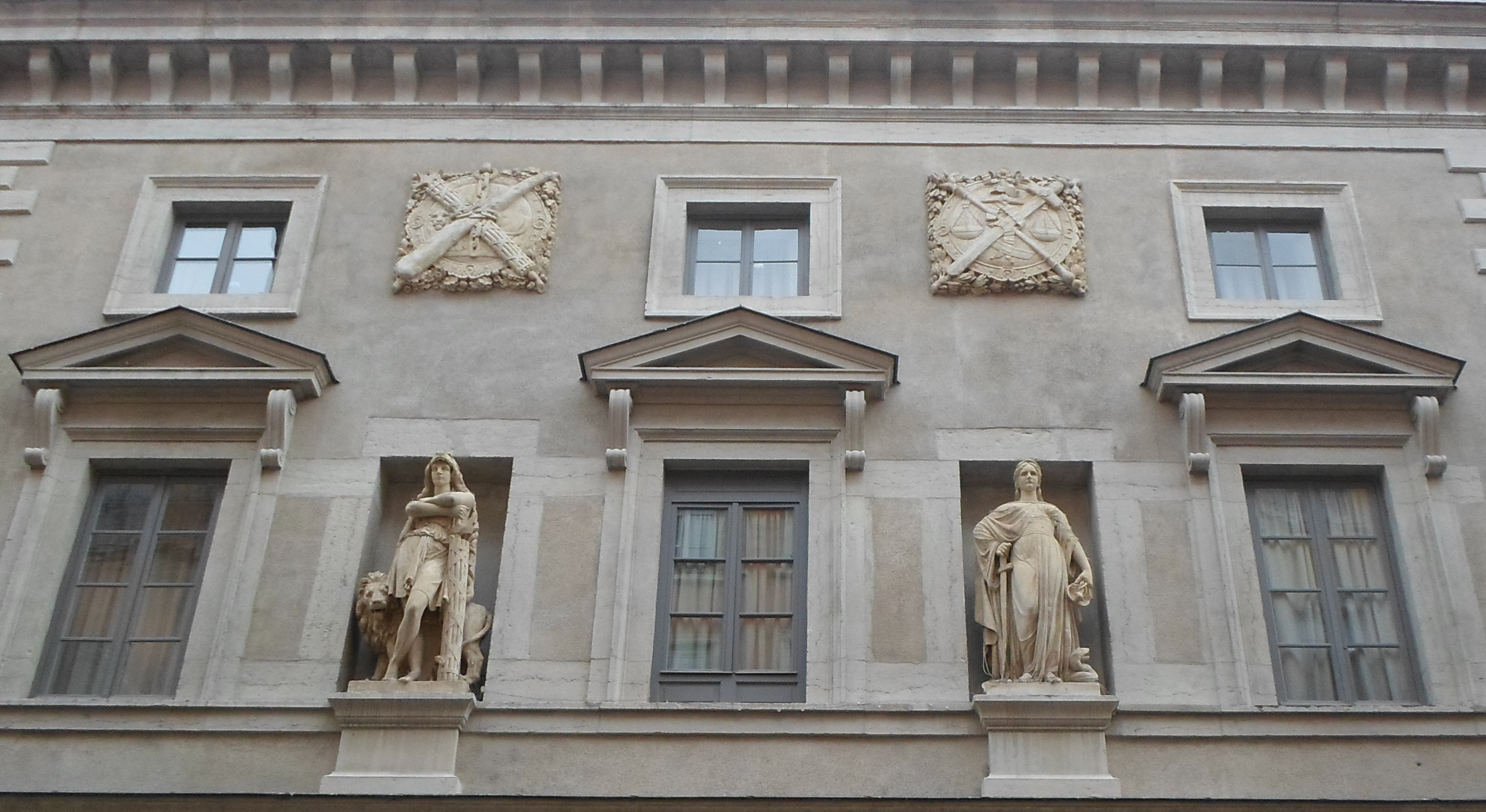 Palais de justice historique de Lyon, détail sur la façade ouest. Statues et armoiries.